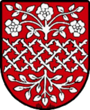 Wappen der ehemaligen Gemeinde Garanas, Steiermark